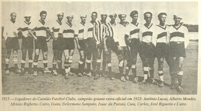 Time do Catalão em 1923